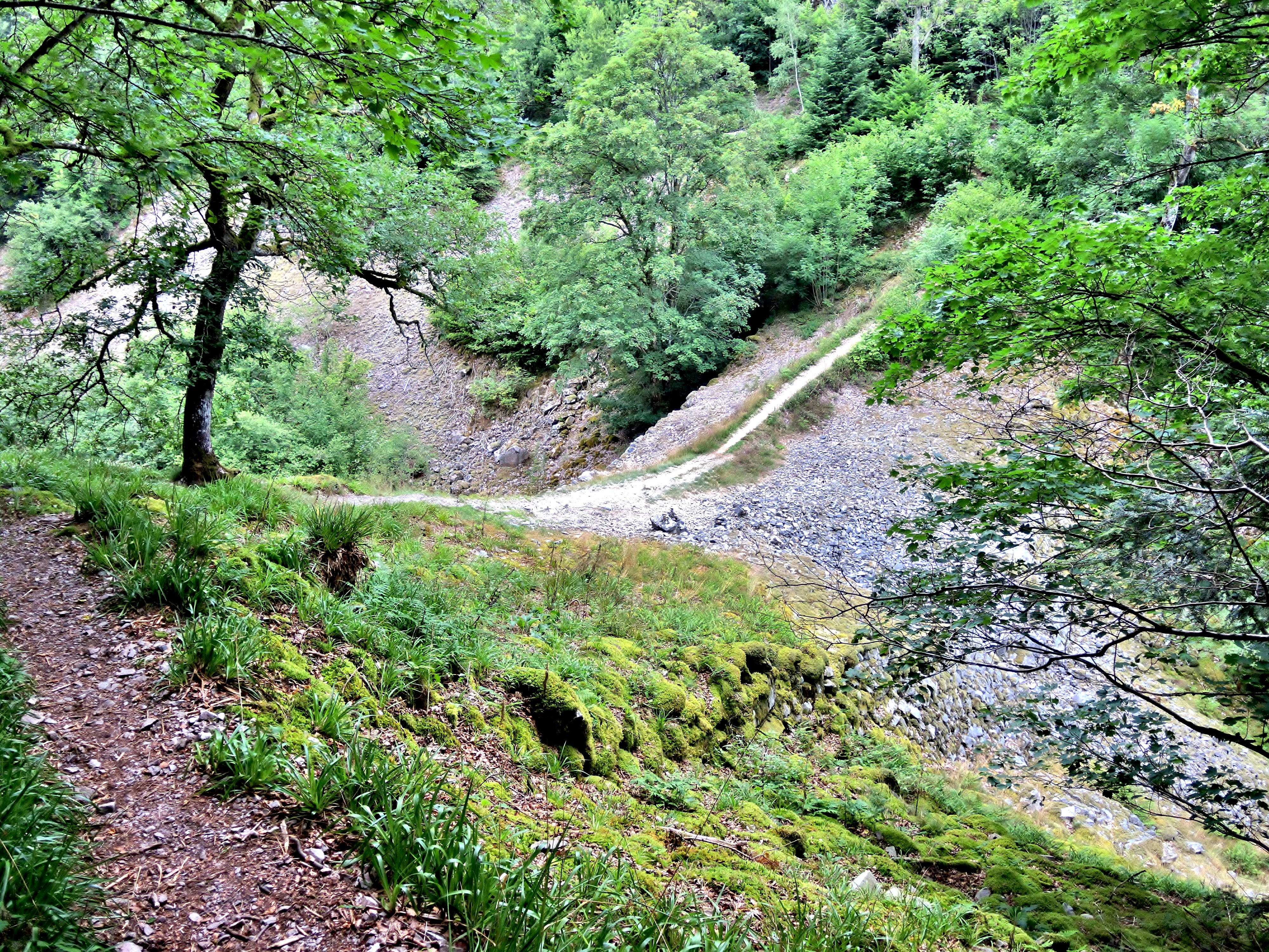 Le pont des Fées, vu du côté du Saint Mont. Saint-Etienne-lès-Remiremont. Vosges